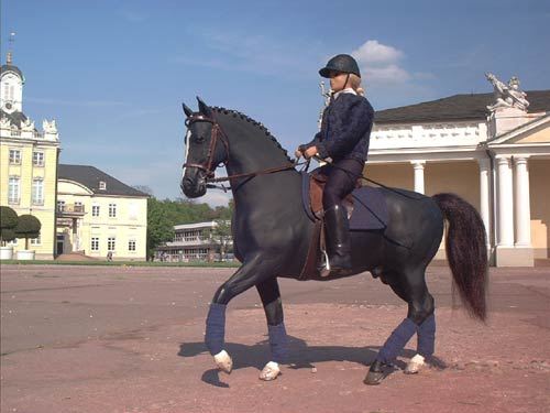 Modellpferd mit Zubehör in realistischer Kulisse